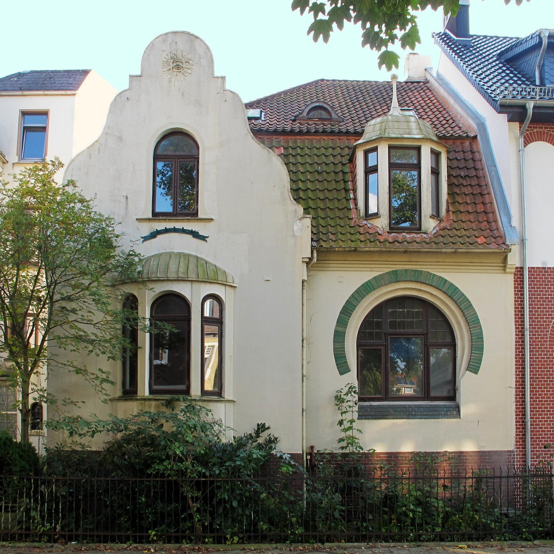 Haus Rahusen in Bremerhaven, Kurfürstenstraße 3 Das abgebildete Objekt ist ein geschütztes Kulturdenkmal in der Freien Hansestadt Bremen, mit der Nr. 3244 beim Landesamt für Denkmalpflege registriert.